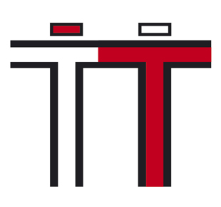 logo Teatru Tworzenia